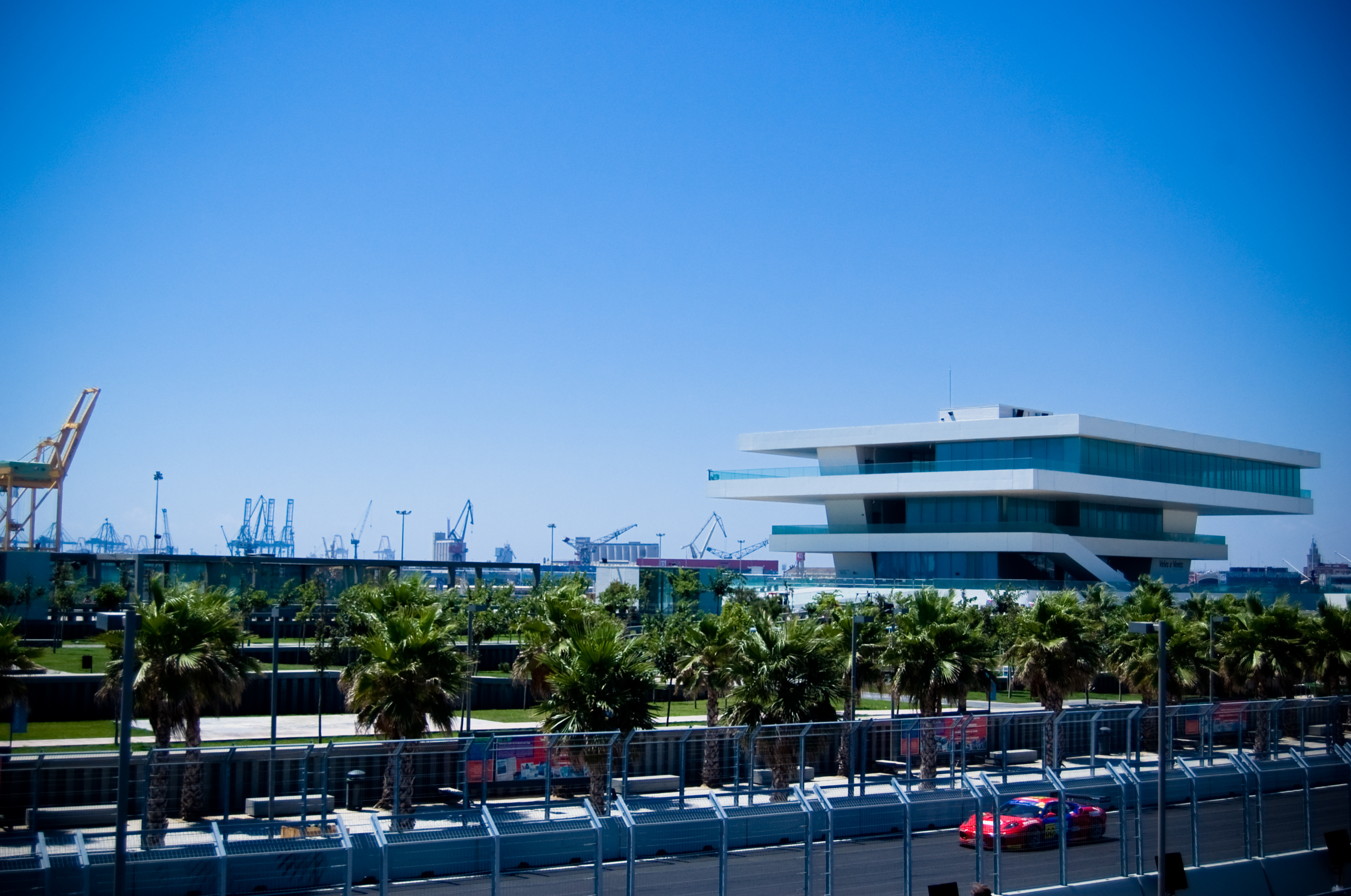 Valencia Street Circuit GT Open